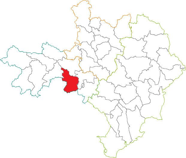 Situation du canton dans le département du Gard (France)